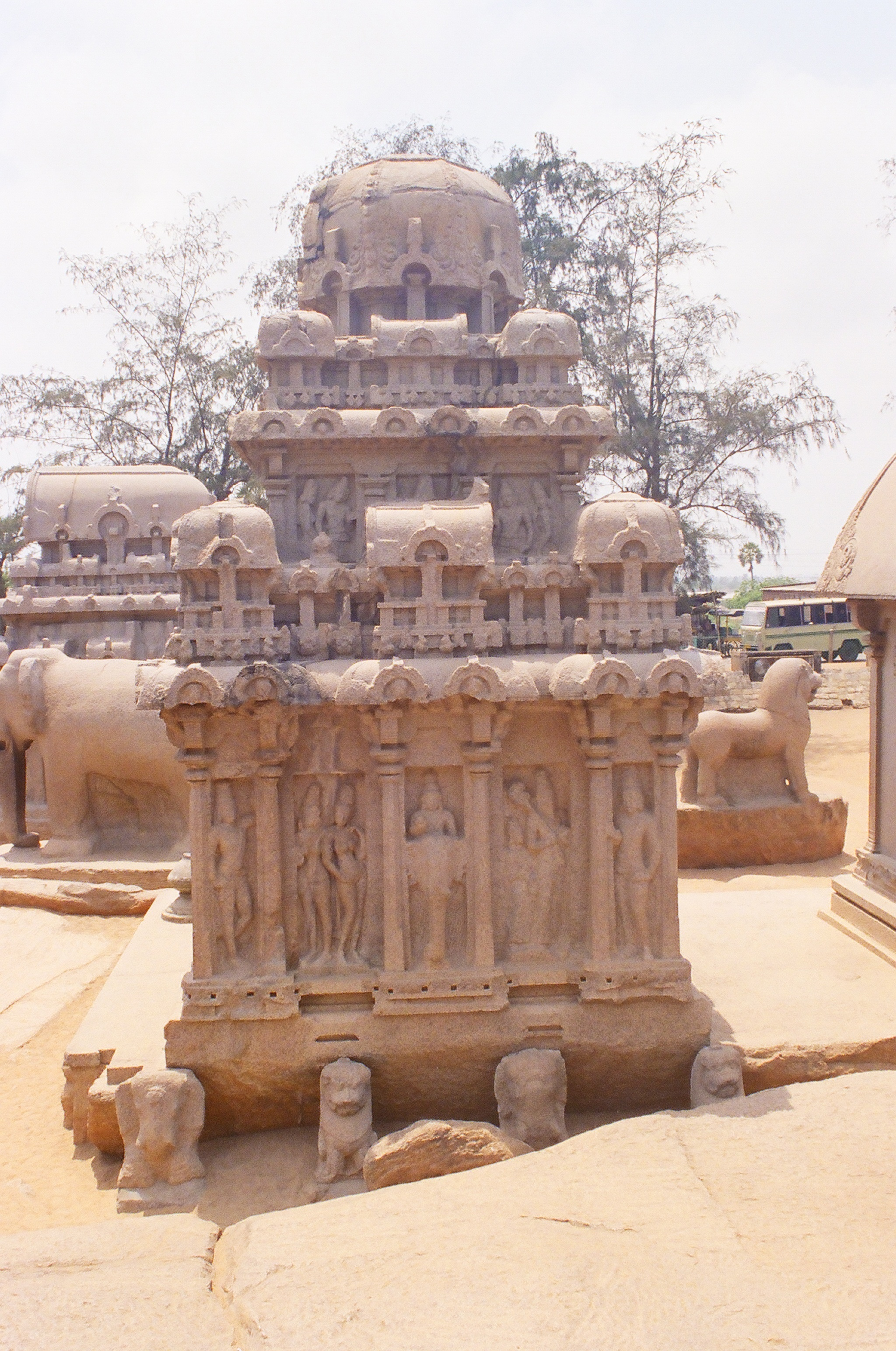 மாமல்லபுரம் கடற்கரைக் கோயில்